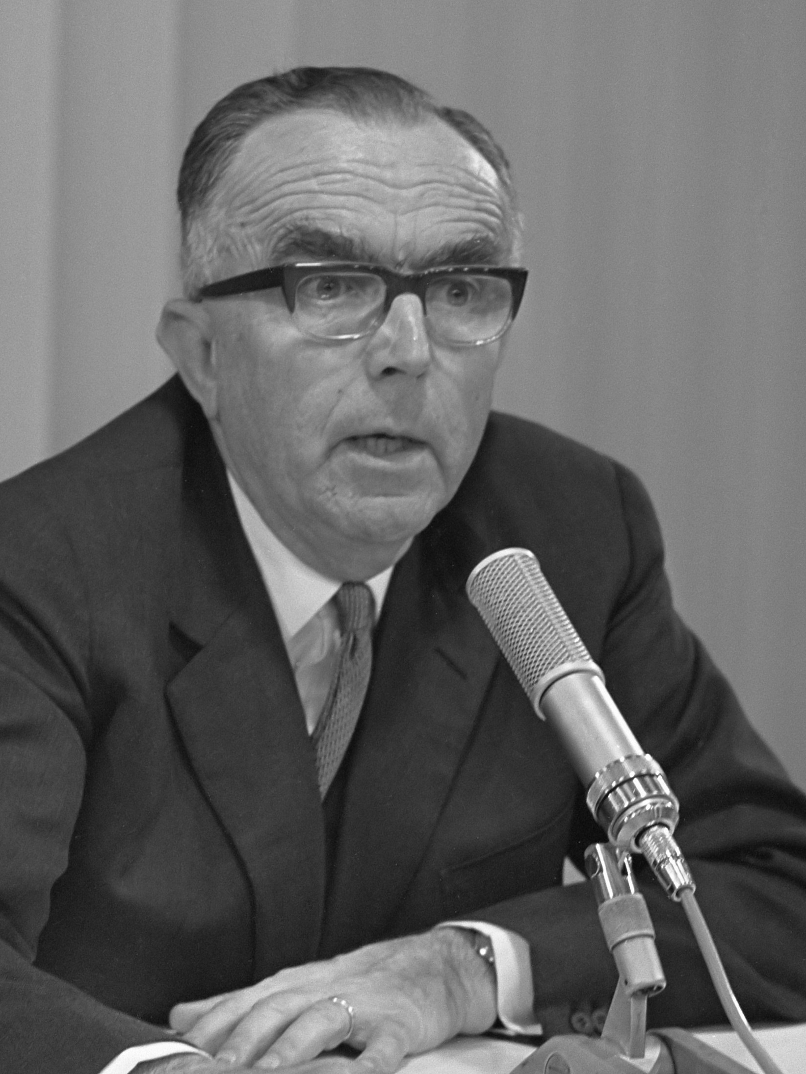 Aankomst Willem Bruynzeel (directeur) op Schiphol, hier tijdens persconferentie 6 februari 1968